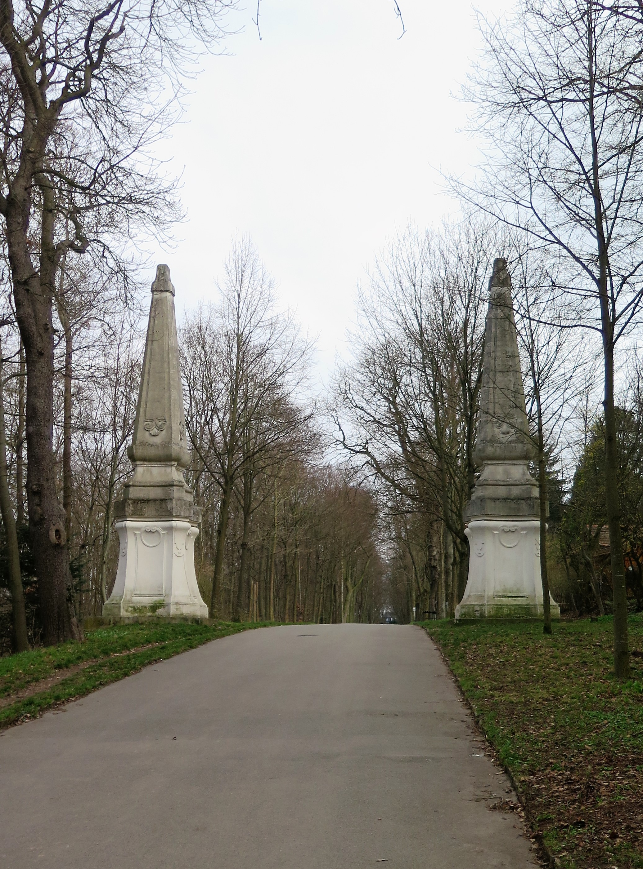 Schwarzenbergpark Obelisken